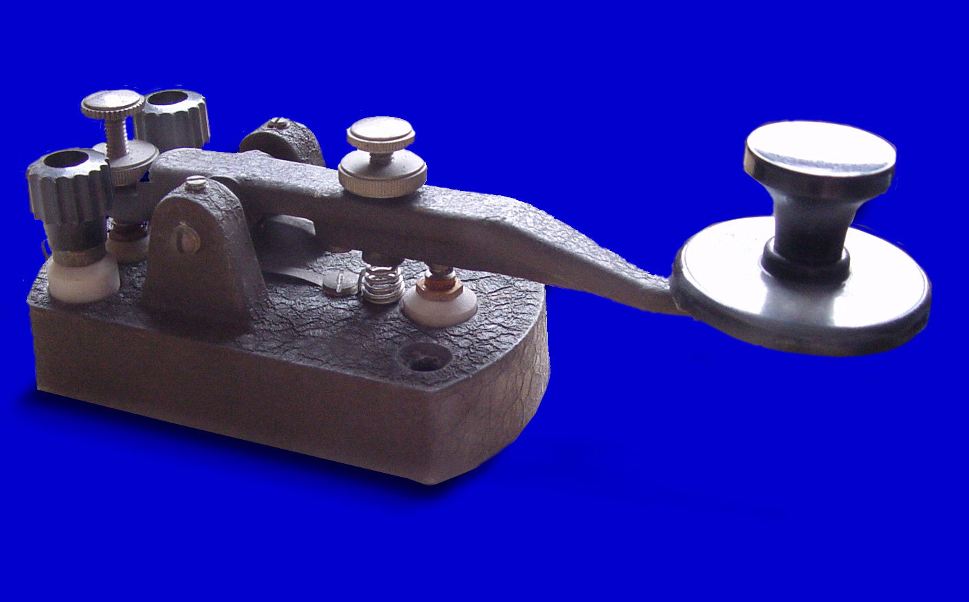 appareil électrique destiné à émettre en alphabet morse (inventé par Samuel Finley Breese Morse)